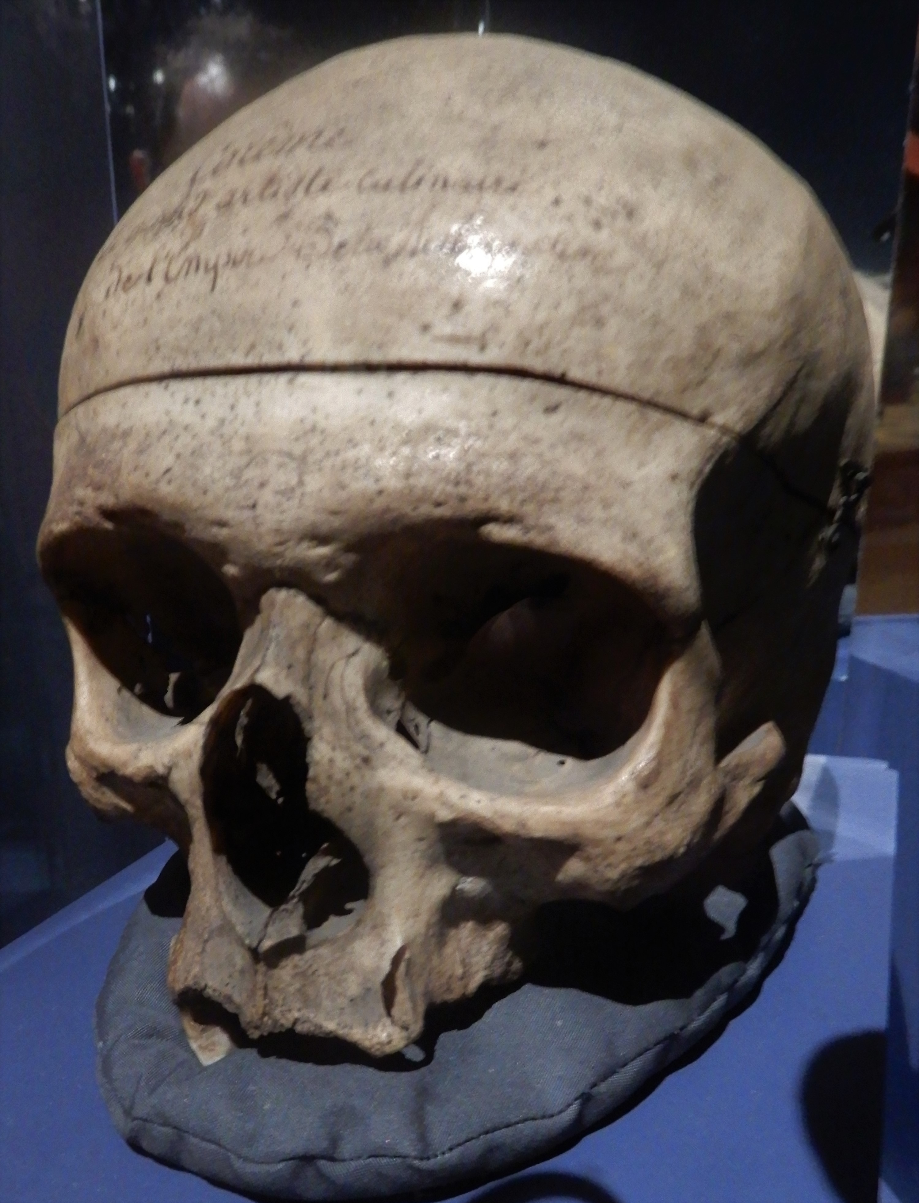 Le crâne de Marie-Antoine Carême a rejoint la collection de P. M. A. Dumoutier Dumoutier à l'époque où l'on croyait en la phrénologie. Il a ensuite rejoint les collections du Musée de l'Homme. Voir Ackerknecht E. H. P. M. A. Dumoutier et la collection phrénologique du Musée de l'Homme. In: Bulletins et Mémoires de la Société d'anthropologie de Paris, X° Série. Tome 7 fascicule 5-6, 1956. pp. 289-308.